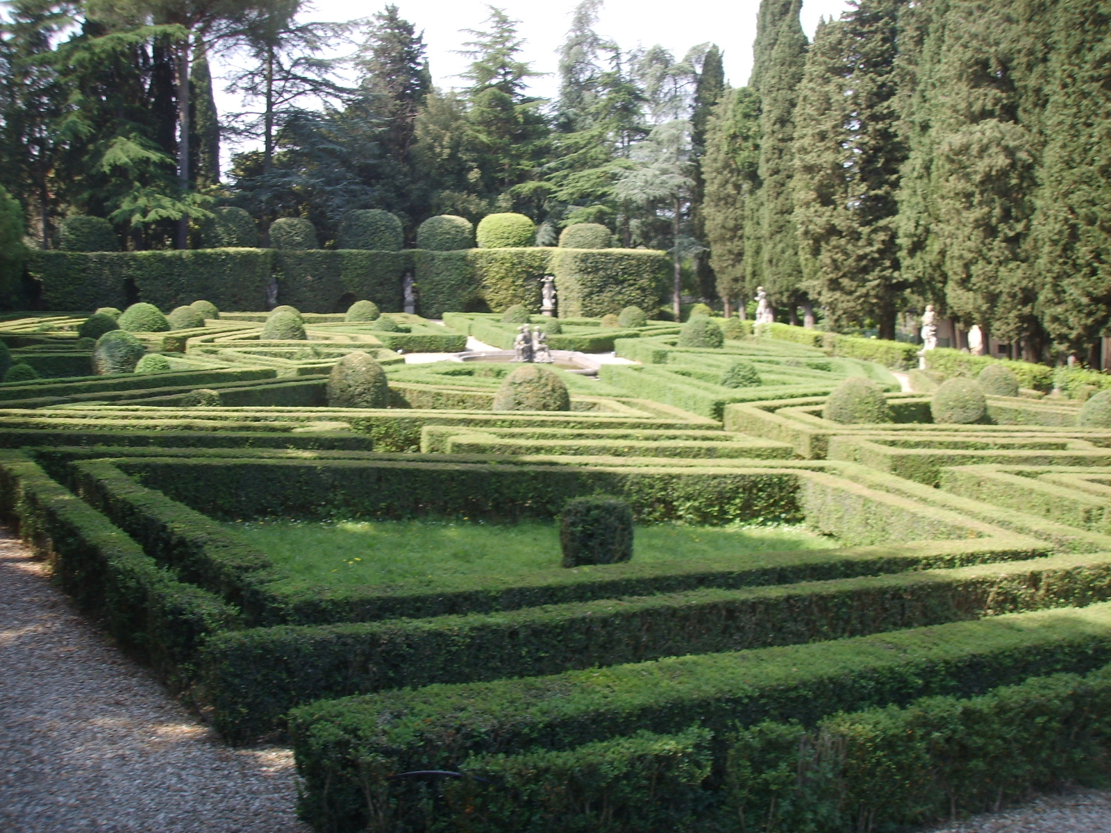 Villa schifanoia, giardino